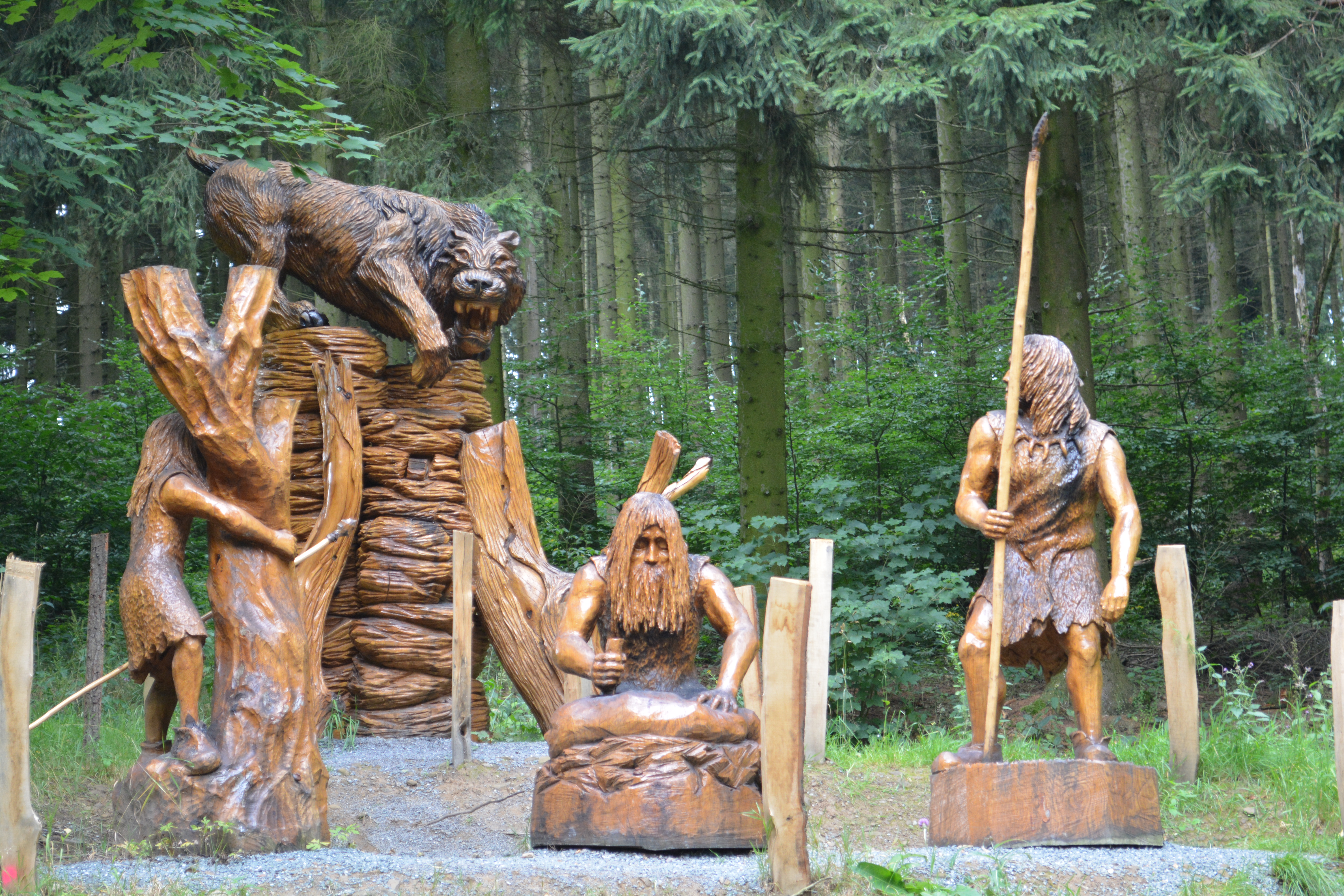 Blockhausen: Kettensägen-Schnitzen, Bienenbeuten